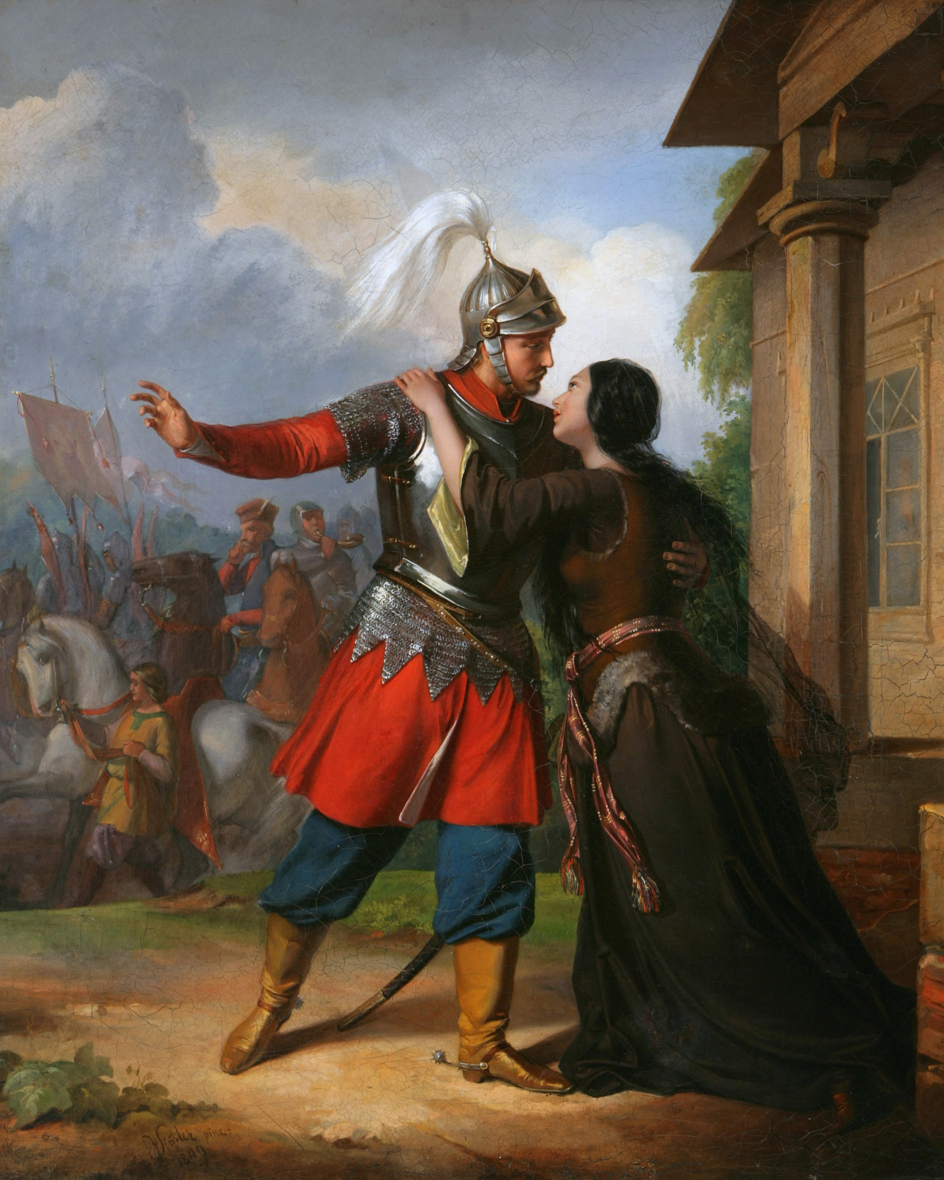 Tableau de Józef Simmler réalisé à Paris aux alentours de 1849